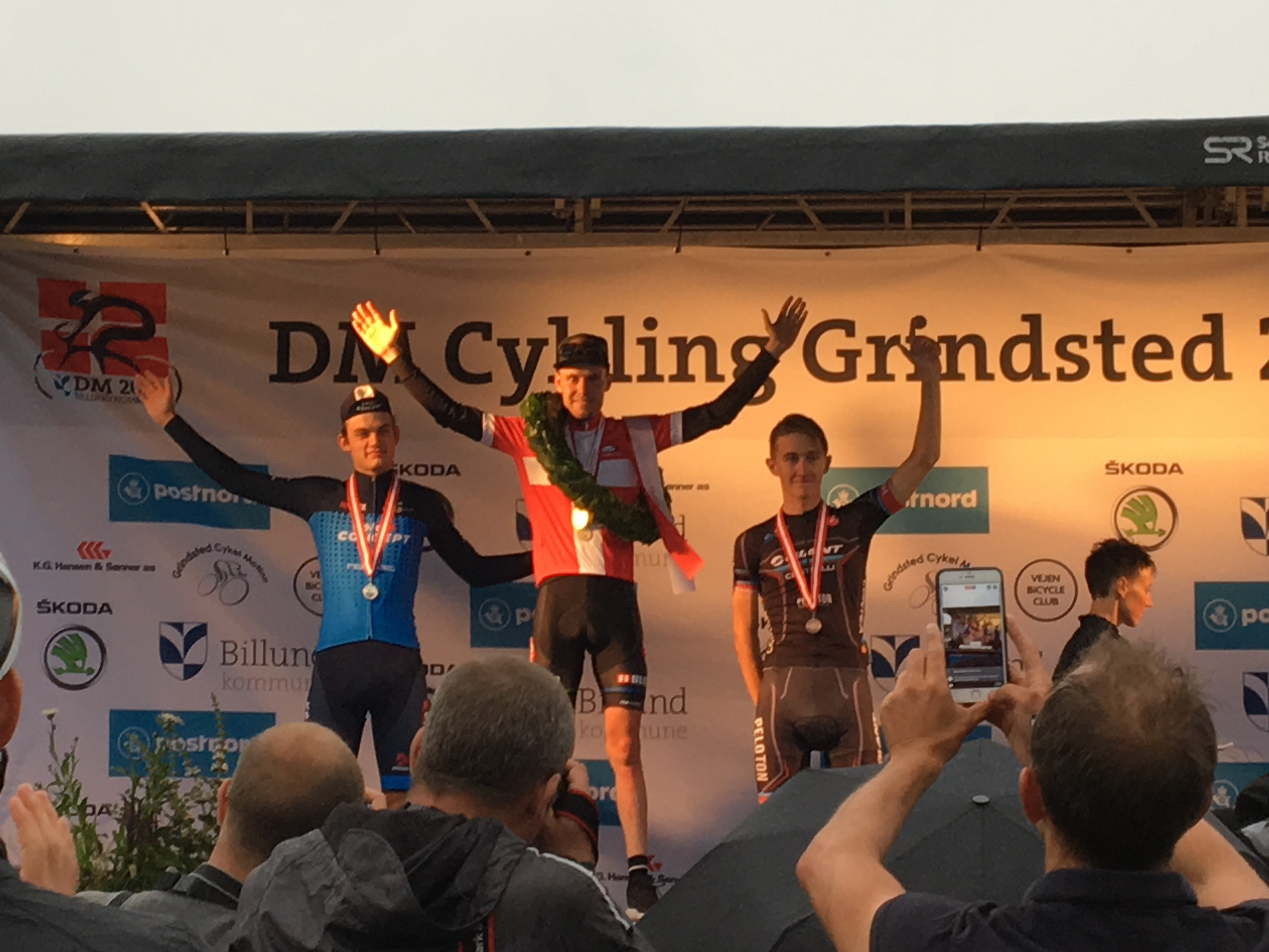 Podiet ved DM i enkeltstart 2017 i Grindsted